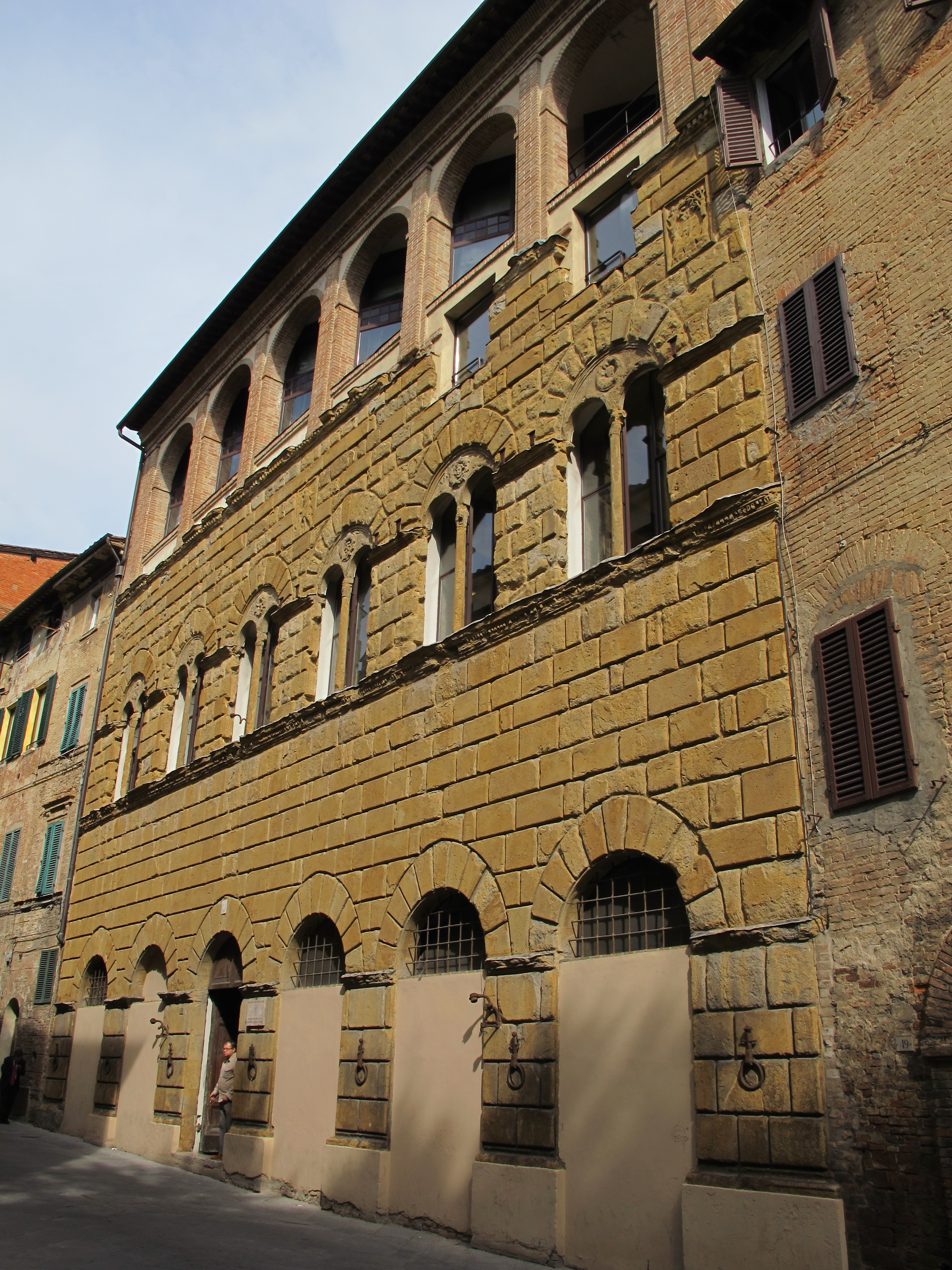 Siena, Via Roma e dintorni